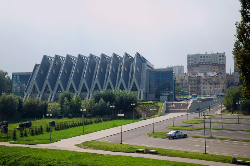 Podpromie Hall of Rzeszów